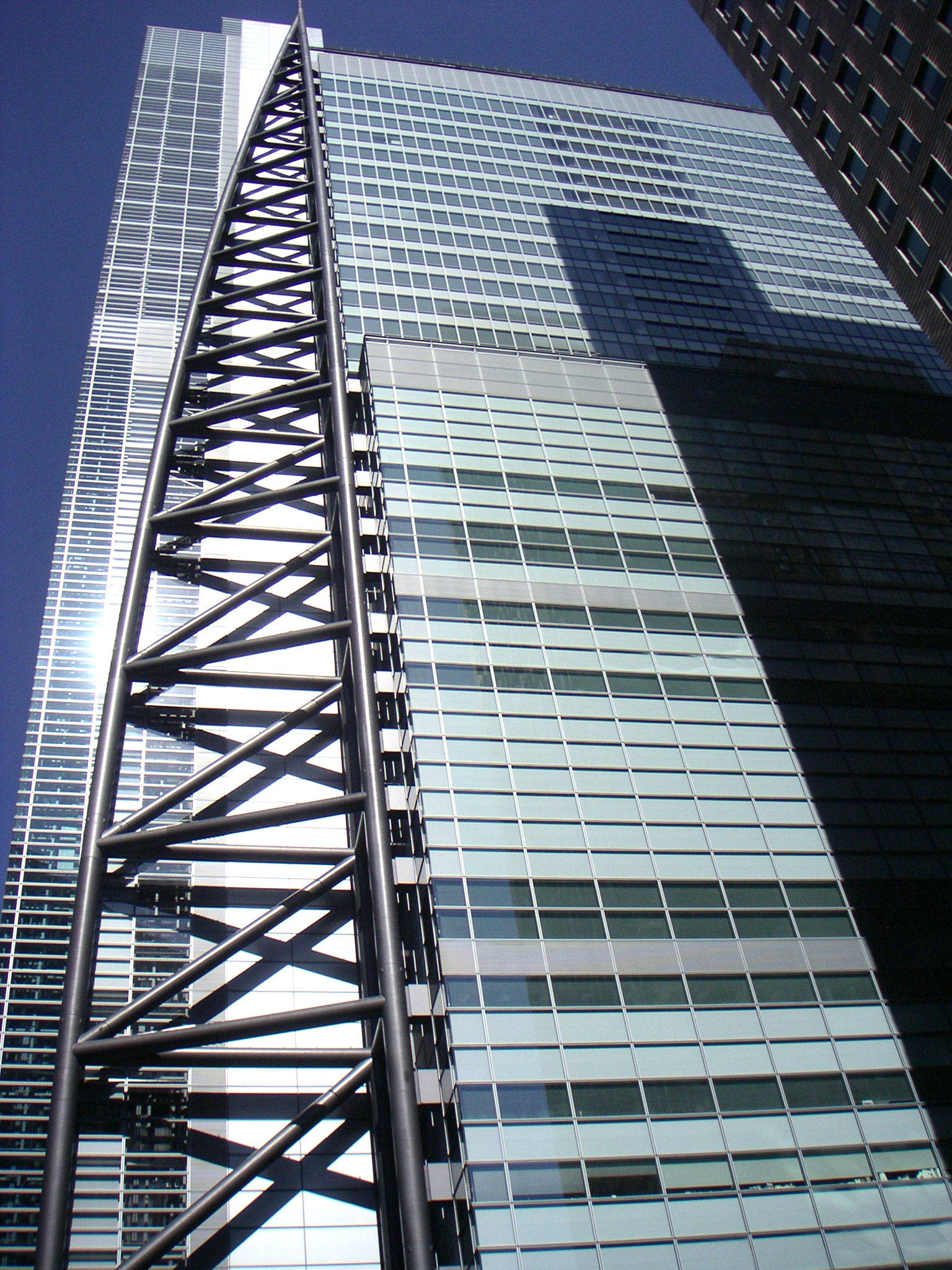 NTV Tower ja: NTVタワー